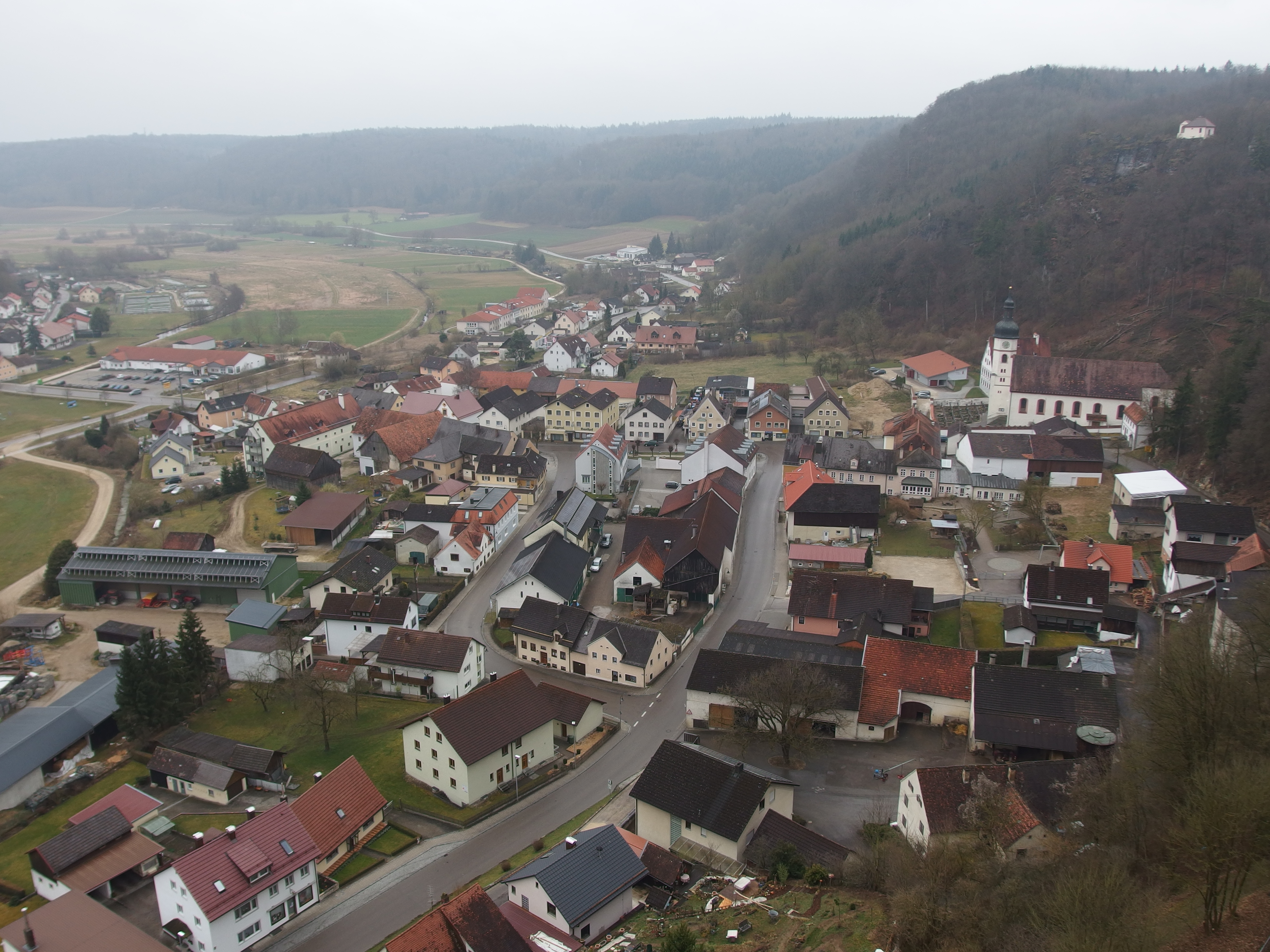 Blick auf Wellheim